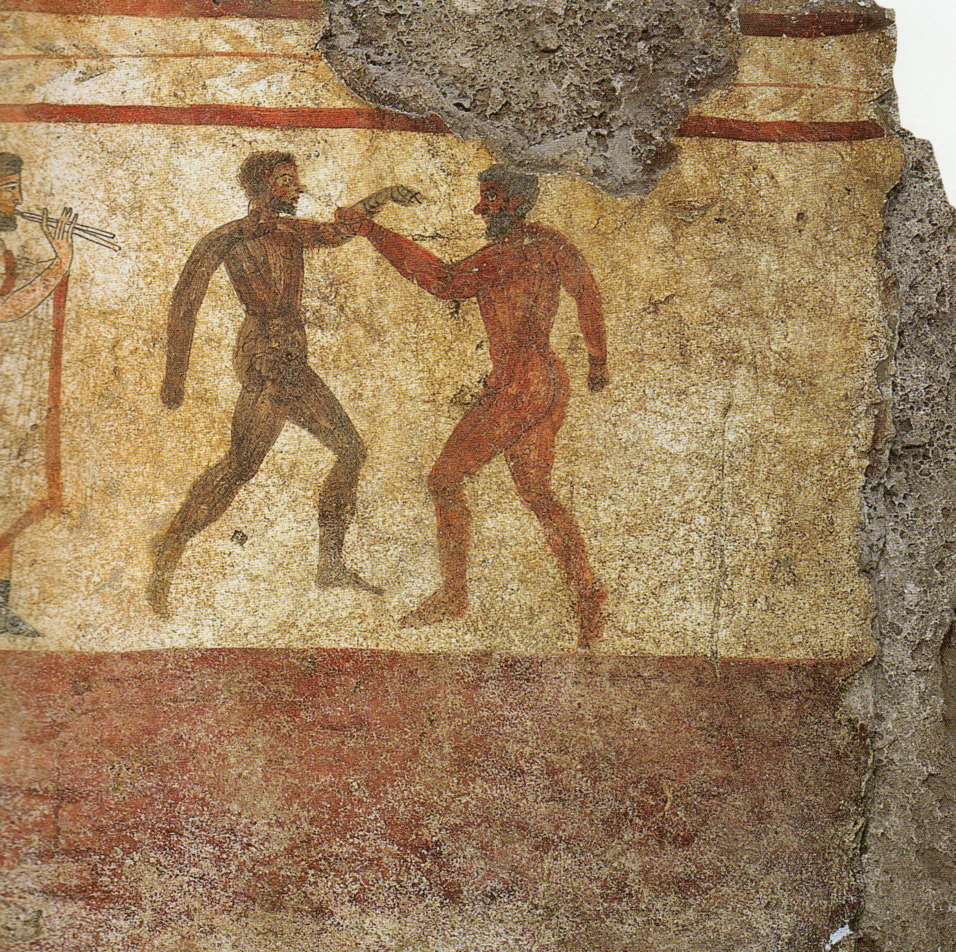 Paestum, Grab des bunten Hahnes. Detail